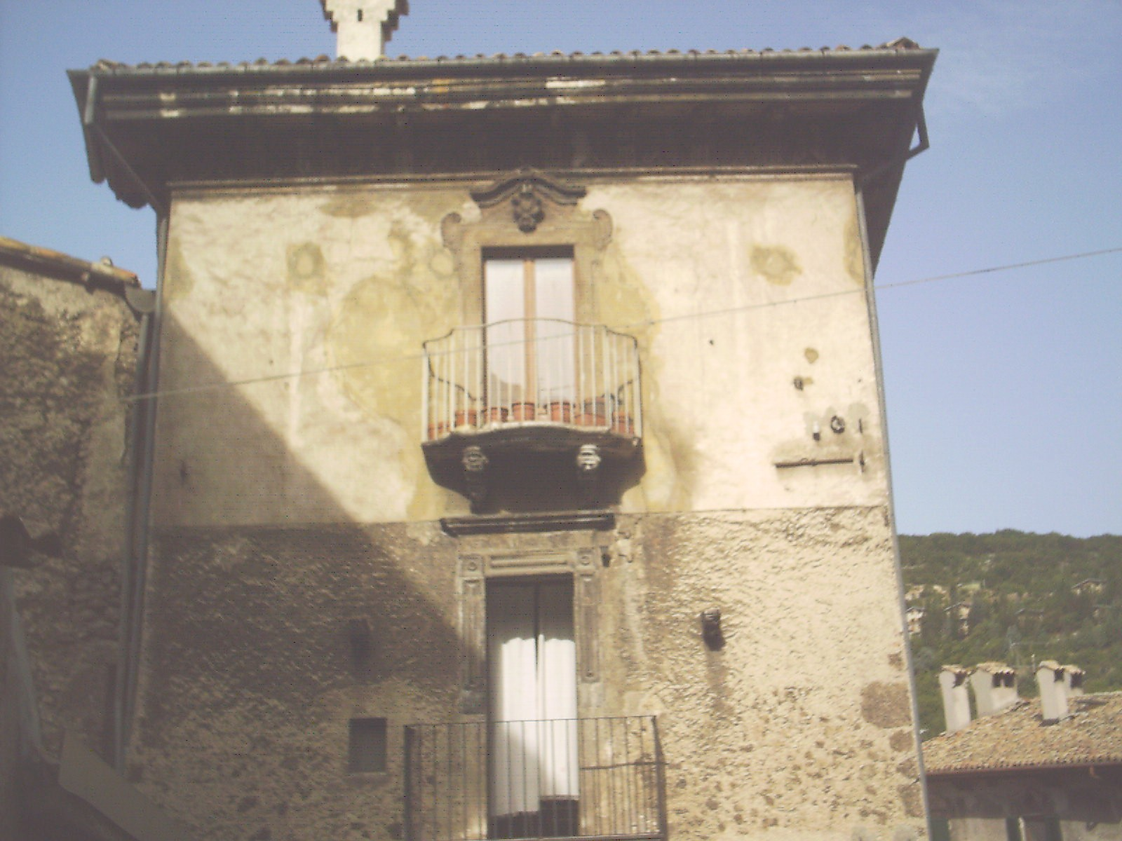 Prospetto laterale del Palazzo Mosca (Scanno, provincia dell'Aquila)